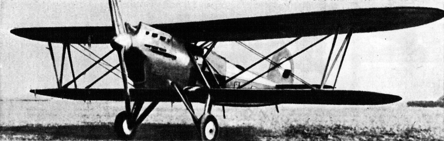 Czechosłowacki samolot bombowy Aero A.100.